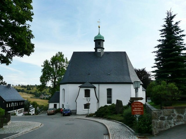 Deutschneudorf: Blick zur Kirche